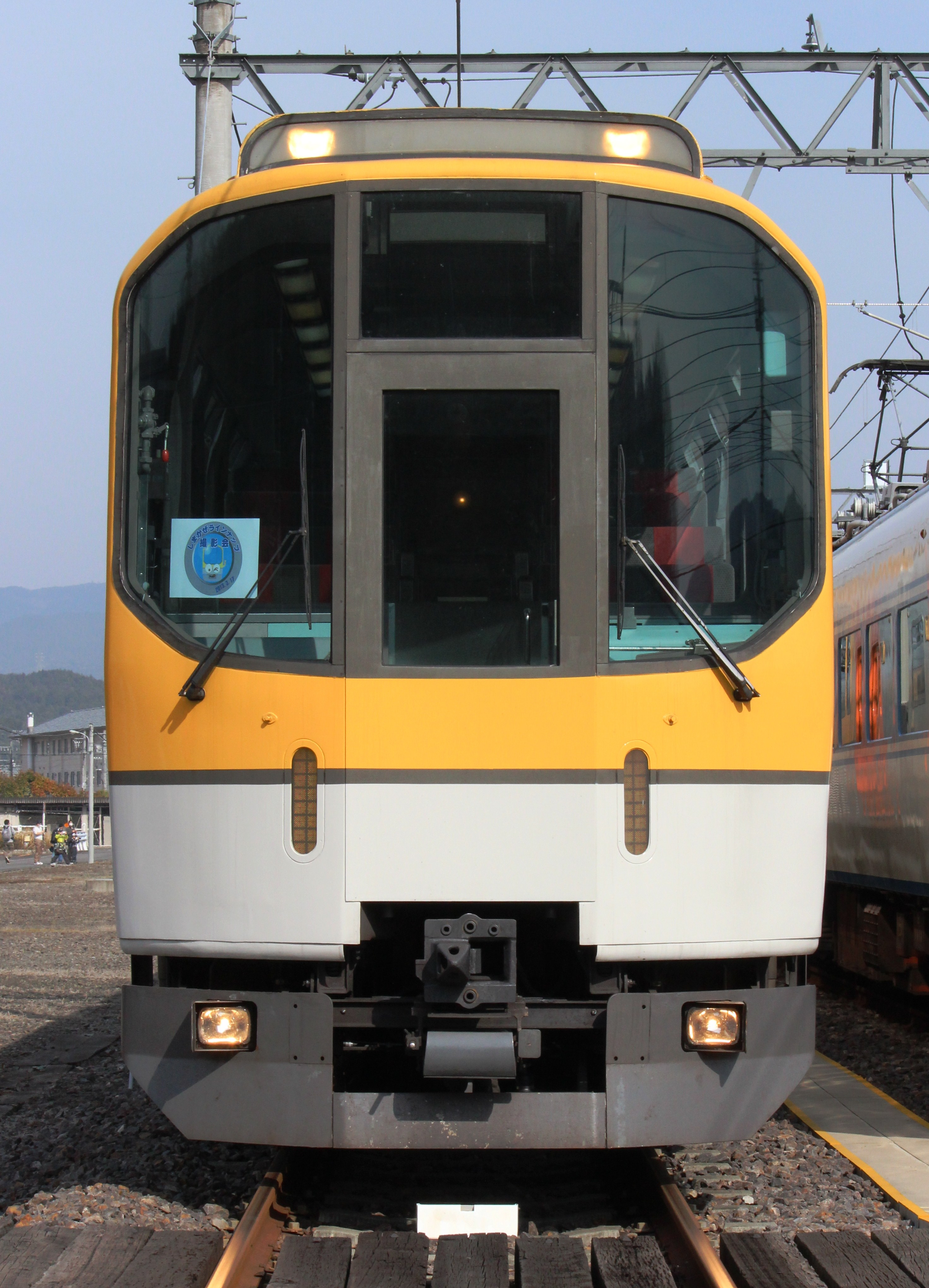 近鉄20000系正面